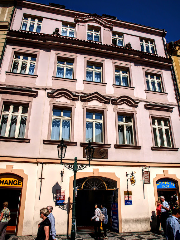 Dům Bernarda Bolzana v Praze